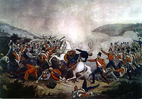 Il generale inglese George Cathcart (1794-1854) viene colpito alla battaglia di Inkerman (5 novembre 1854) durante la guerra di Crimea.